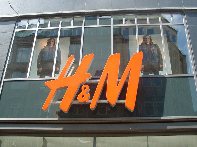 H&M logo in Hamburg / H&M-Logo in der Spitalerstraße in Hamburg